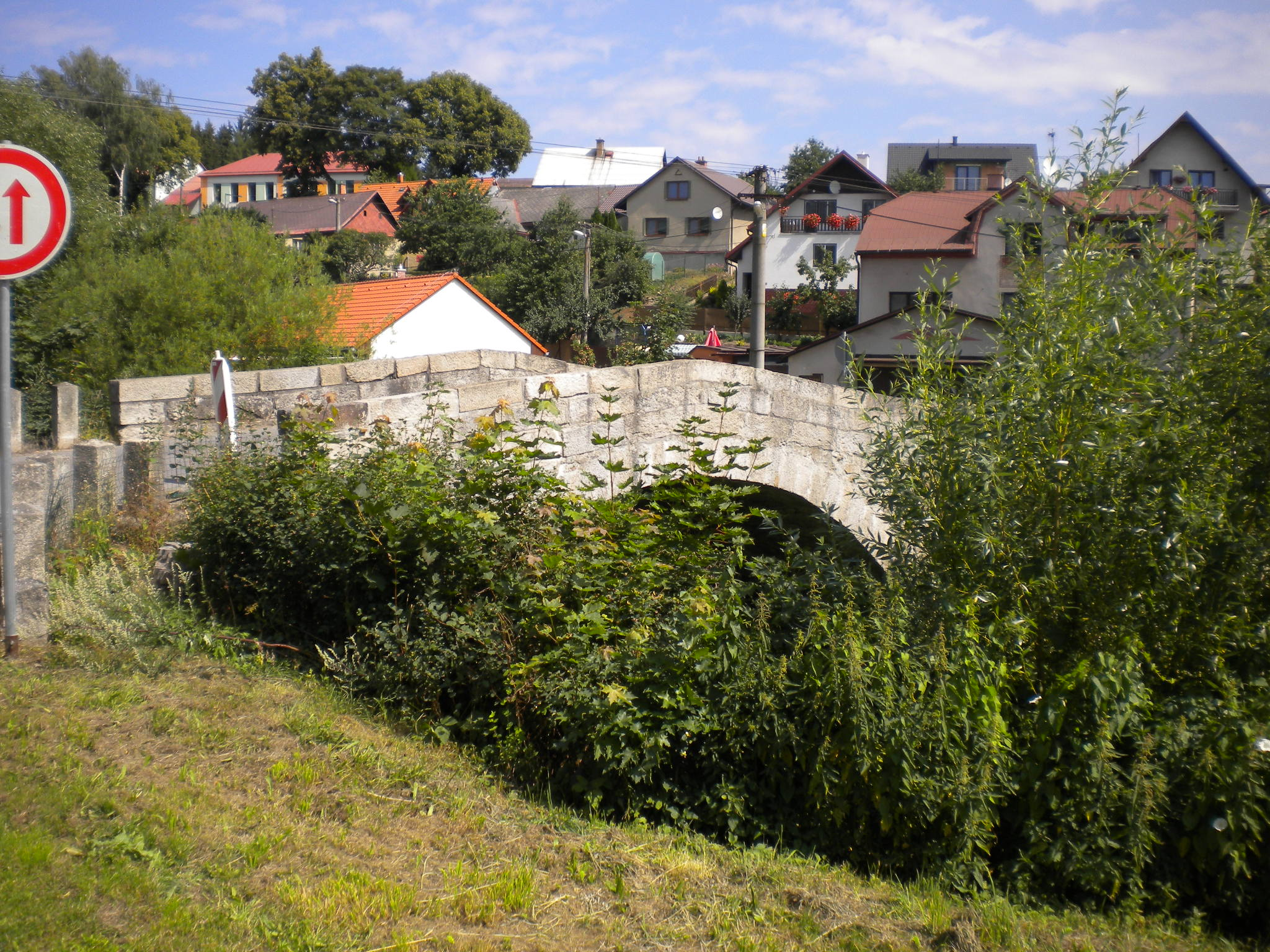 Kamenný most v Hamrech nad Sázavou